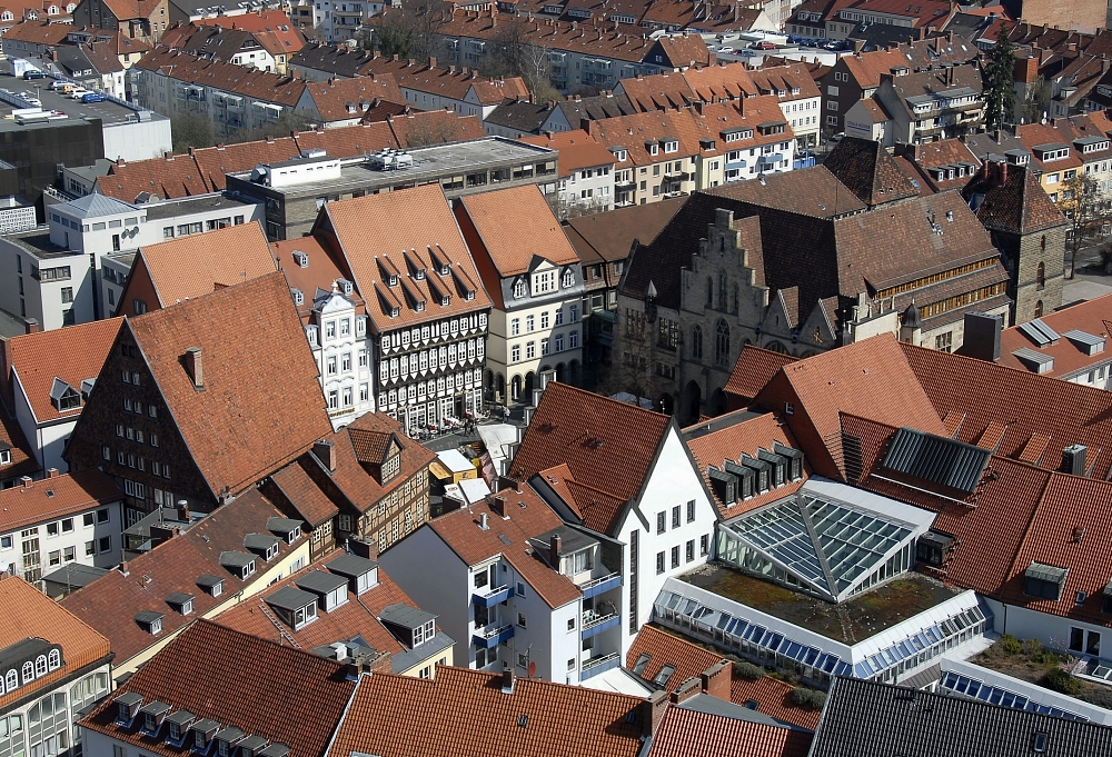 La Piazza del Mercato di Hildesheim vista dalla torre di Sant'Andrea